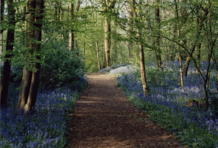 Jacinthe début mai dans le bois de Lewarde, Sébastien Majerowicz